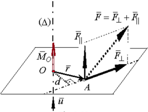 Calculul momentului faţă de o axă